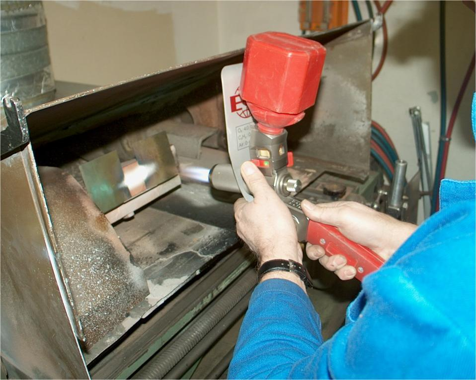 Flammspritzen von Silber auf Kupfer